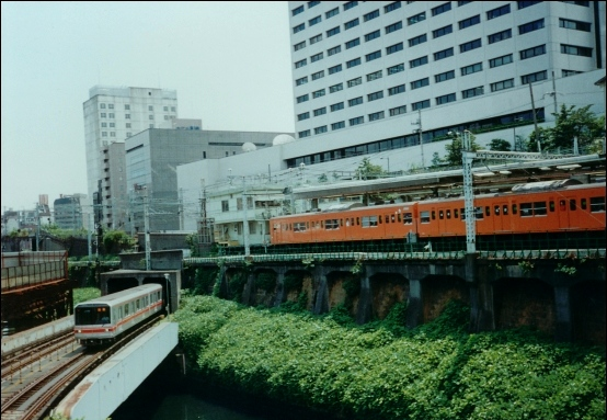 Train metro at Akihabara district.